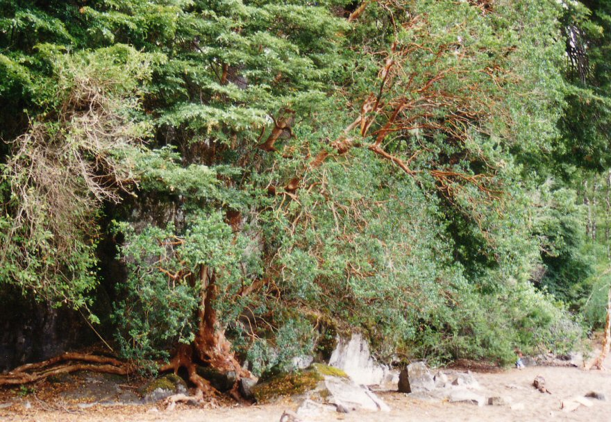 Arrayán tree at lakeside in Patagonia